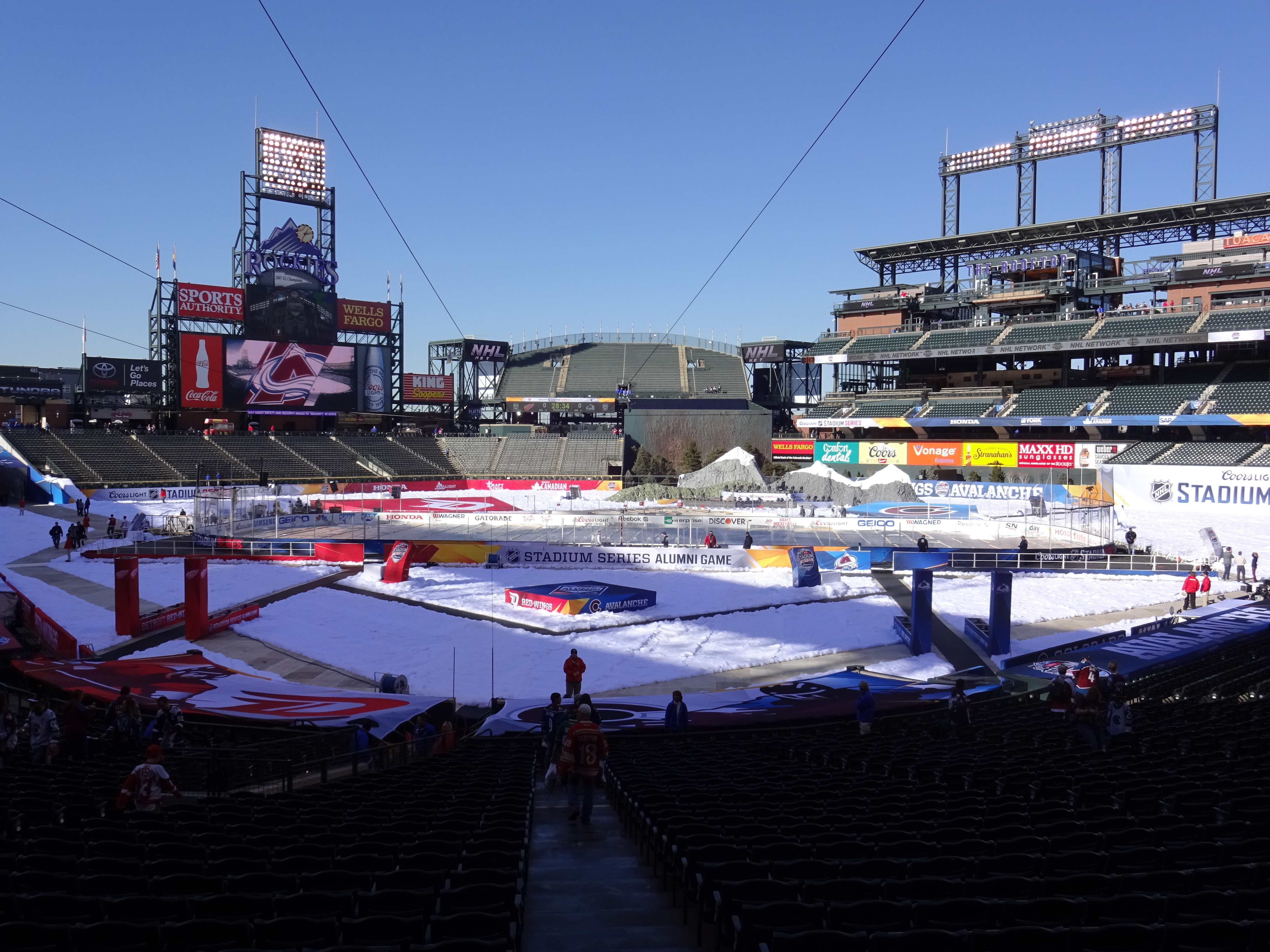 Det @ Col (Alumni), 26-Feb-2016